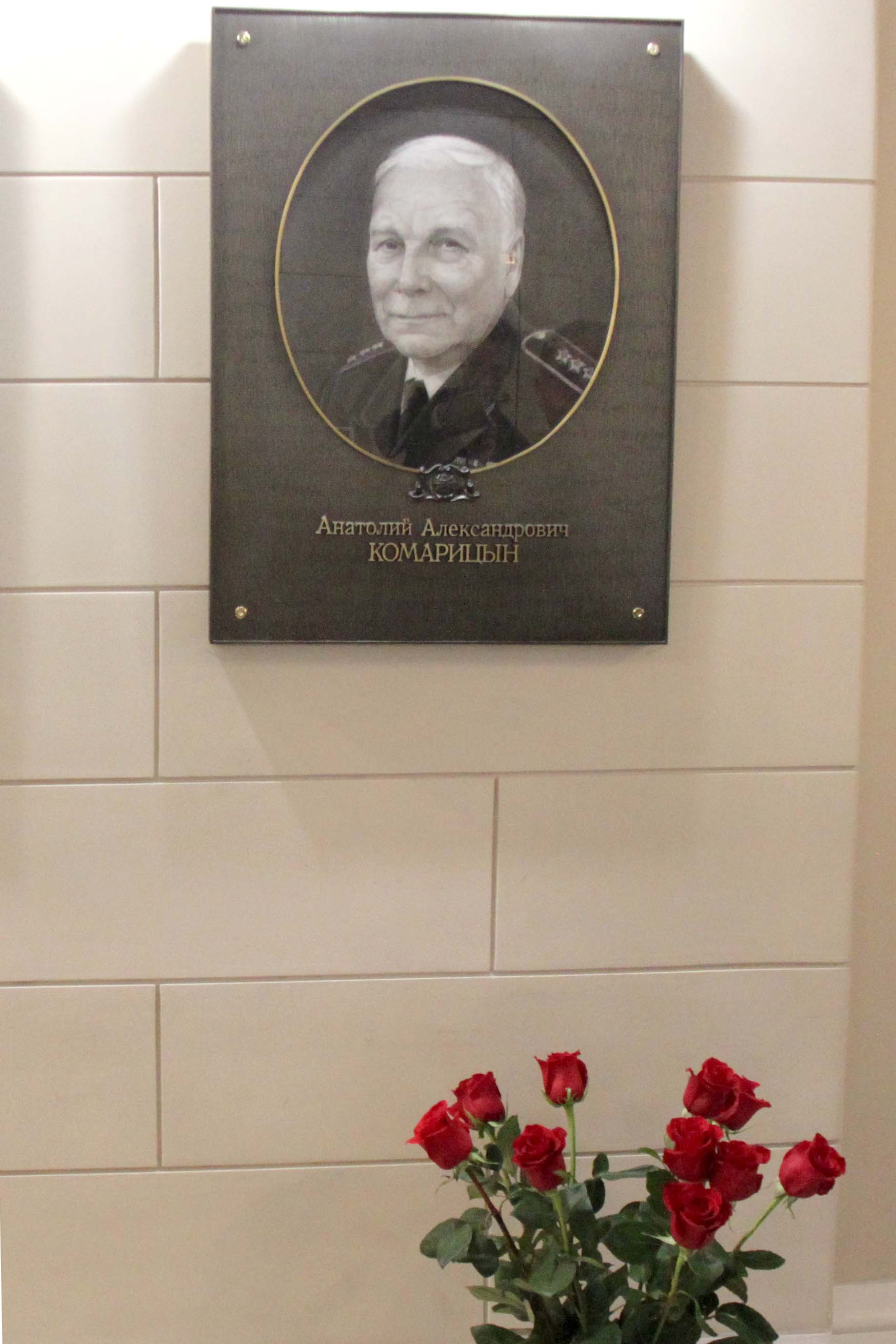 Портрет адмирала Анатолия Александровича Комарицына на парадной лестнице Русского географического общества в галерее выдающихся деятелей и президентов РГО